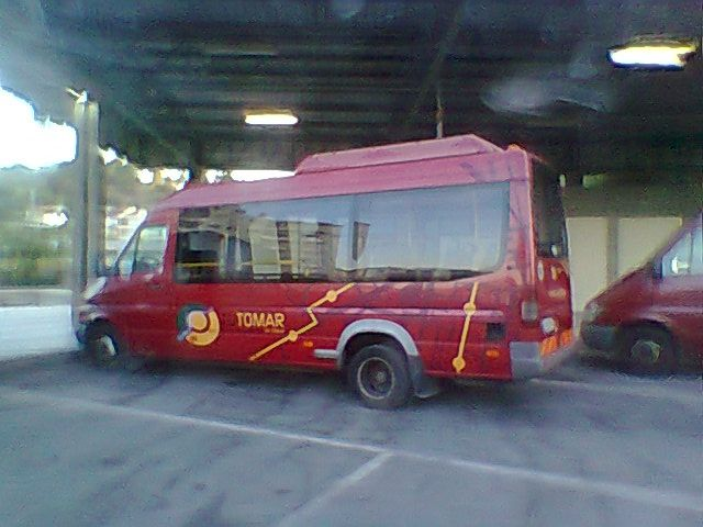 Minibus TUTomar